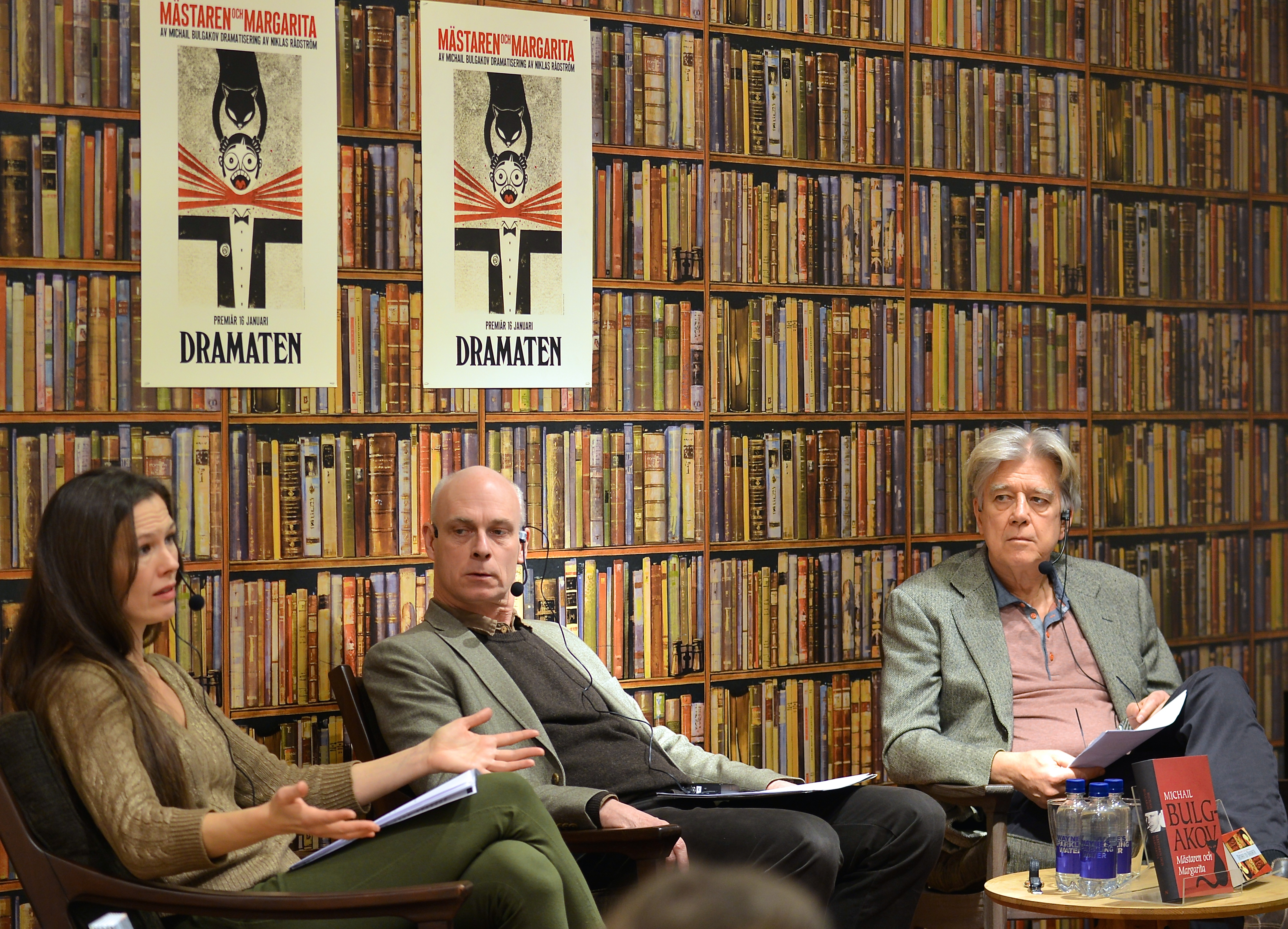 Elin Klinga, Magnus Florin och Hans Klinga från Dramaten samtalar om pjäsen Mästaren och Margarita på Akademibokhandeln på Mäster Samuelsgatan i Stockholm den 29 januari 2014.